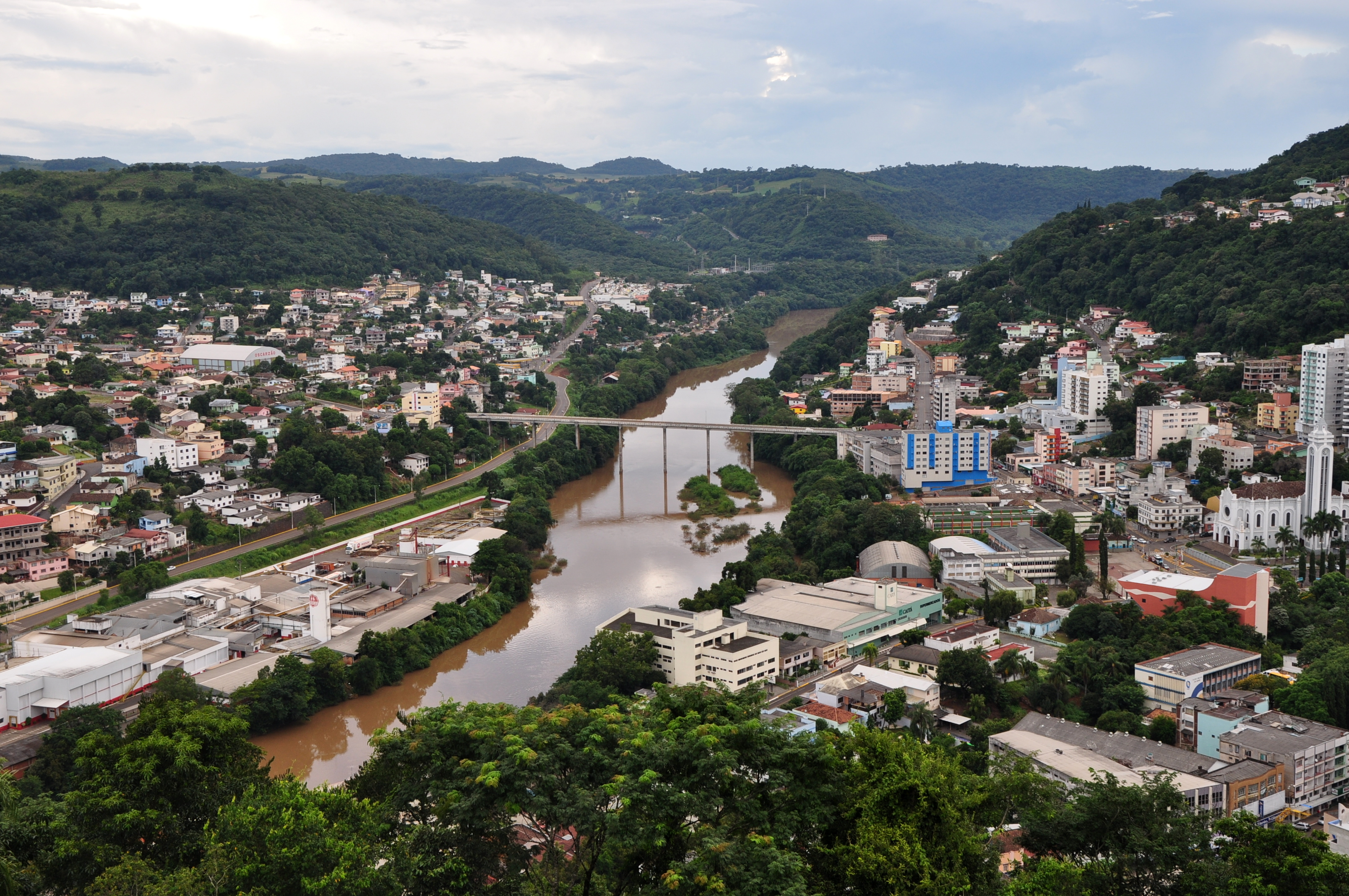 Vale do Rio do Peixe entre as cidades de Joaçaba e Herval d'Oeste